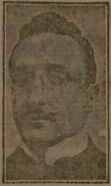 Baronul Carlo Fasciotti ambasadorul Italiei în România (1911-1918)